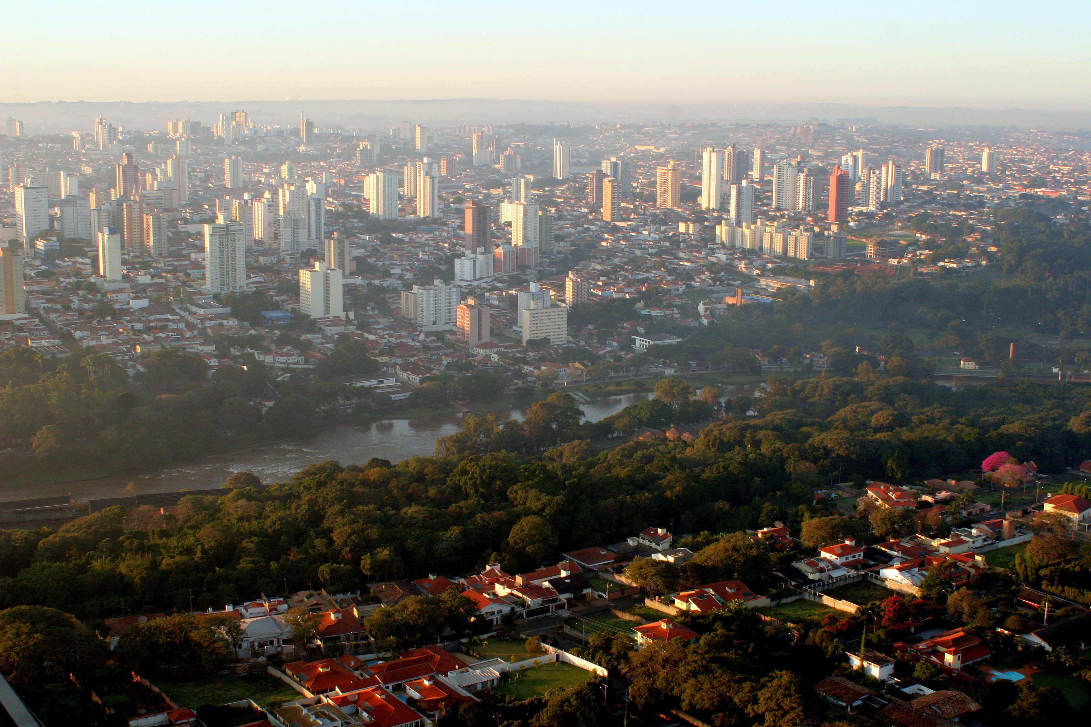 Vista de Piracicaba, Brasil